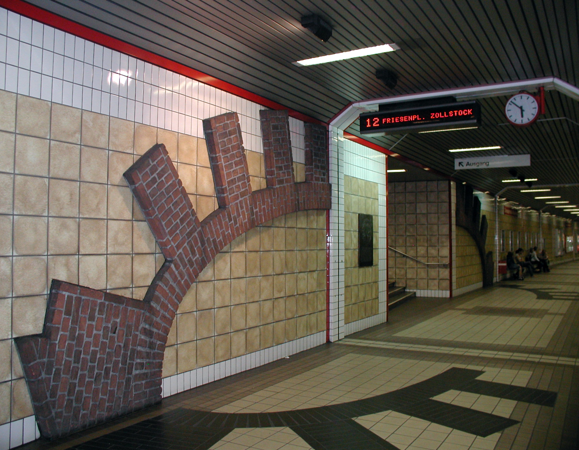 Köln, U-Station Christophstraße, Gedenktafel neben stilisierter Darstellung des mittelalterlichen Stadtmauertores Gereon.